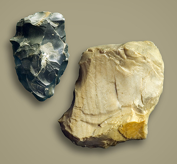 Востраканечнiк i скэблападобная прылада працы эпохi сярэдняга палеалiту з Абiдавiчаў.(Нацыянальны музей гісторыі і культуры Беларусі. Мінск)